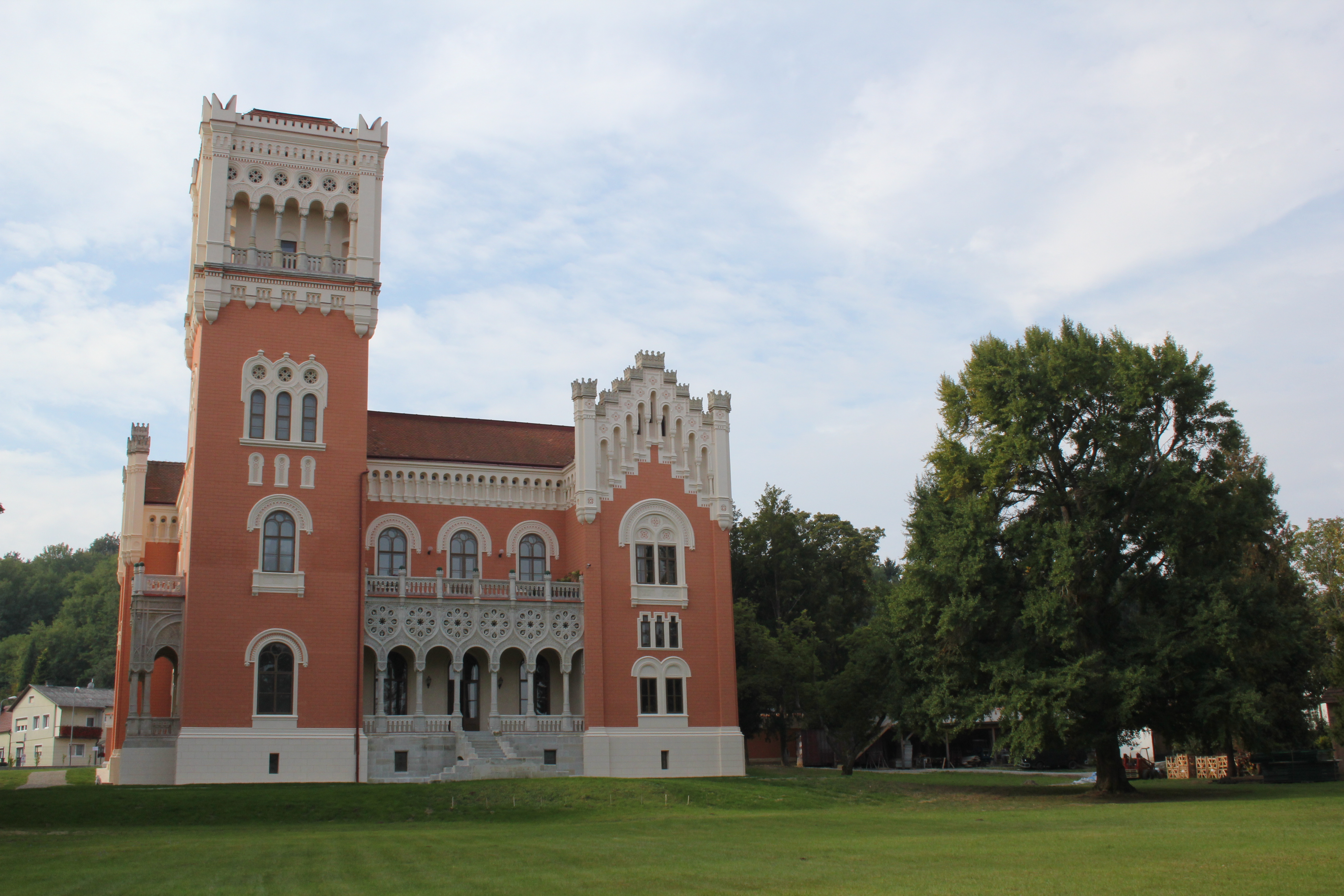 Schloss Rotenturm Ostseite Dieses Bild wurde anlässlich des österreichischen Tags des Denkmals 2015 im Burgenland eingereicht.